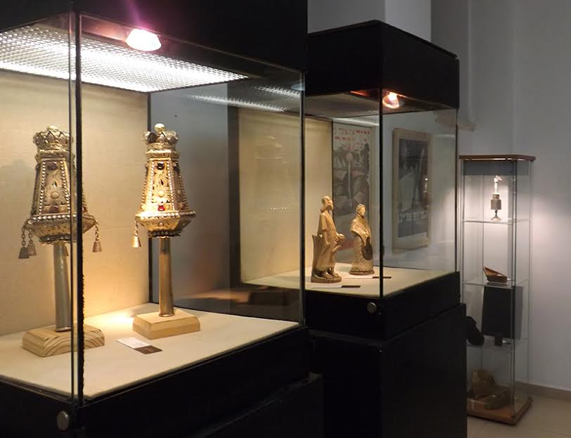 קדם- פריטים בגלריה